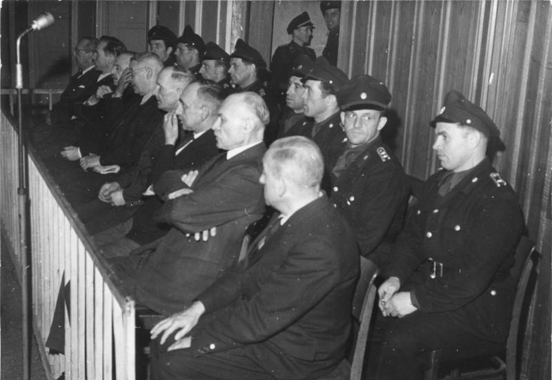 Zentralbild/Heilig, Beginn des Dessauer Millionenschieber-Prozesses. Am 24. April 1950 begann vor dem ersten Strafsenat des Obersten Gerichts der Deutschen Demokratischen Republik der Prozess gegen den ehemaligen Minister für Arbeit und Sozialwesen von Sachsen-Anhalt, Herwegen, und seine Mitangeklagten. Die Verhandlungen, die unter starker Teilnahme der werktätigen Bevökerung im Landestheater Dessau stattfinden werden von der Vizepräsidentin des Obersten Gerichtshofes, Hilde Benjamin, geführt. Dr. Leo Herwegen, ehem. Minister für Arbeit und Sozialwesen in Sachsen Anhalt; Prof. Dr. Willi Brundert, ehem. stellvertretender Wirtschaftsminister von Sachsen-Anhalt; Dipl.-Ing. Hermann Müller, ehem. Direktor der Deutschen Continentalen Gasgesellschaft in Dessau; Dr. Leopold Kaatz, ehem. Direktor der Dessauer Zuckerraffinerie und Präsident der Industrie und Handelskammer in Dessau; Ernst Simon, ehem. Landgerichtsdirektor in Dessau und später juristischer Hilfsarbeiter der Deutschen Continentalen Gasgesellschaft; Paul Heil, ehem. Rechtsanwalt und Notar; Ernst Pauli, ehem. Wirtschaftsbeautragter beim Oberbürgermeister der Stadt Dessau und gleichzeitig Leiter der Abteilung Industrie bei der Industrie und Handelskammer in Dessau; Heinrich Scharf, ehem. Mitglied des Direktoriums der Landeskreditbank Sachsen-Anhalt, werden angeklagt, die Überführung des Konzerns der Deutschen Continentalen Gasgesellschaft in das Eigentum des Deutschen Volkes planmäßig sabotiert zu haben. Gegen den ehem. Direktor der Deutsche Continentalen Gasgesellschaft Friedrich Methfessel, der sich durch die Flucht nach Westdeutschland vorläufig der Verantwortung entzogen hat, wird in Abwesenheit verhandelt. Schlussphase und Urteilverkündung im Herwegen-Prozeß: UBz: Die Angeklagten von links nach rechts : Dr. Leo Herwegen, Prof. Dr. Willi Brundert, Dipl. Ing. Hermann Müller, Dr. Leopold Kaatz, Ernst Simon, Paul Heil, Ernst Pauli, Heinrich Scharf, Friedrich Methfessel. , 6313-50